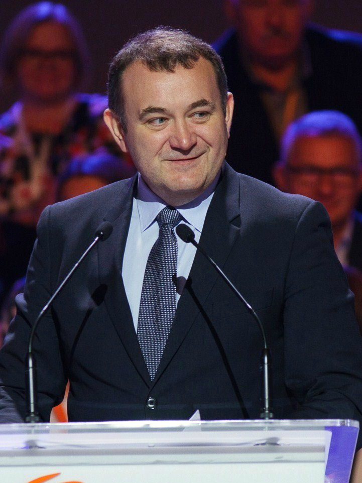 Stanisław Gawłowski, ekonomista i polityk.